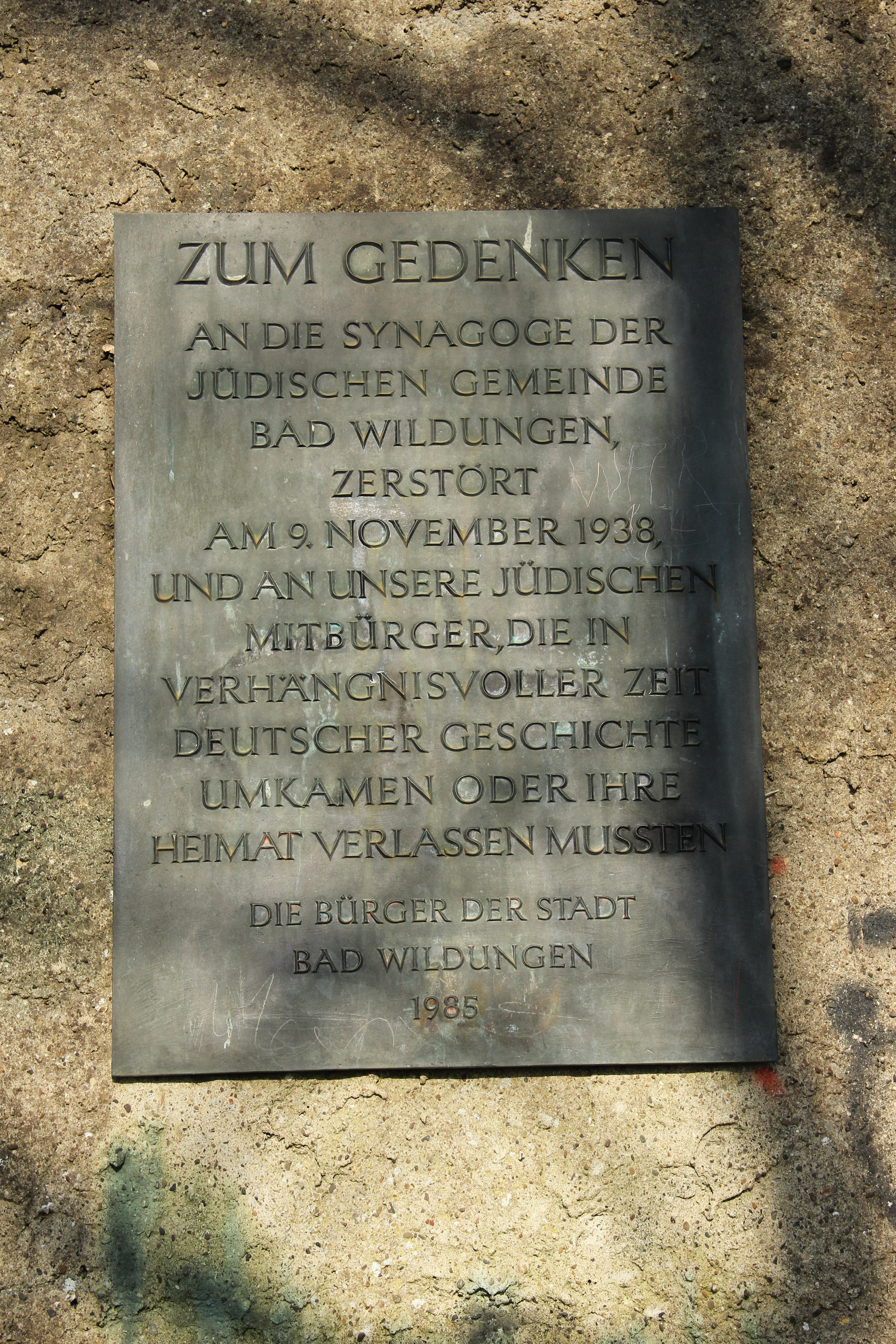 Zum Gedenken an die Synagoge der jüdischen Gemeinde Bad Wildungen, zerstört am 9. November 1938, und an unsere jüdischen Mitbürger, die in verhängnisvoller Zeit deutscher Geschichte umkamen oder ihre Heimat verlassen mußten. Die Bürger der Stadt Bad Wildungen, 1985. Angebracht am Dürren Hagen, etwa 100 Meter entfernt von dem ehem. Synagogengrundstück.